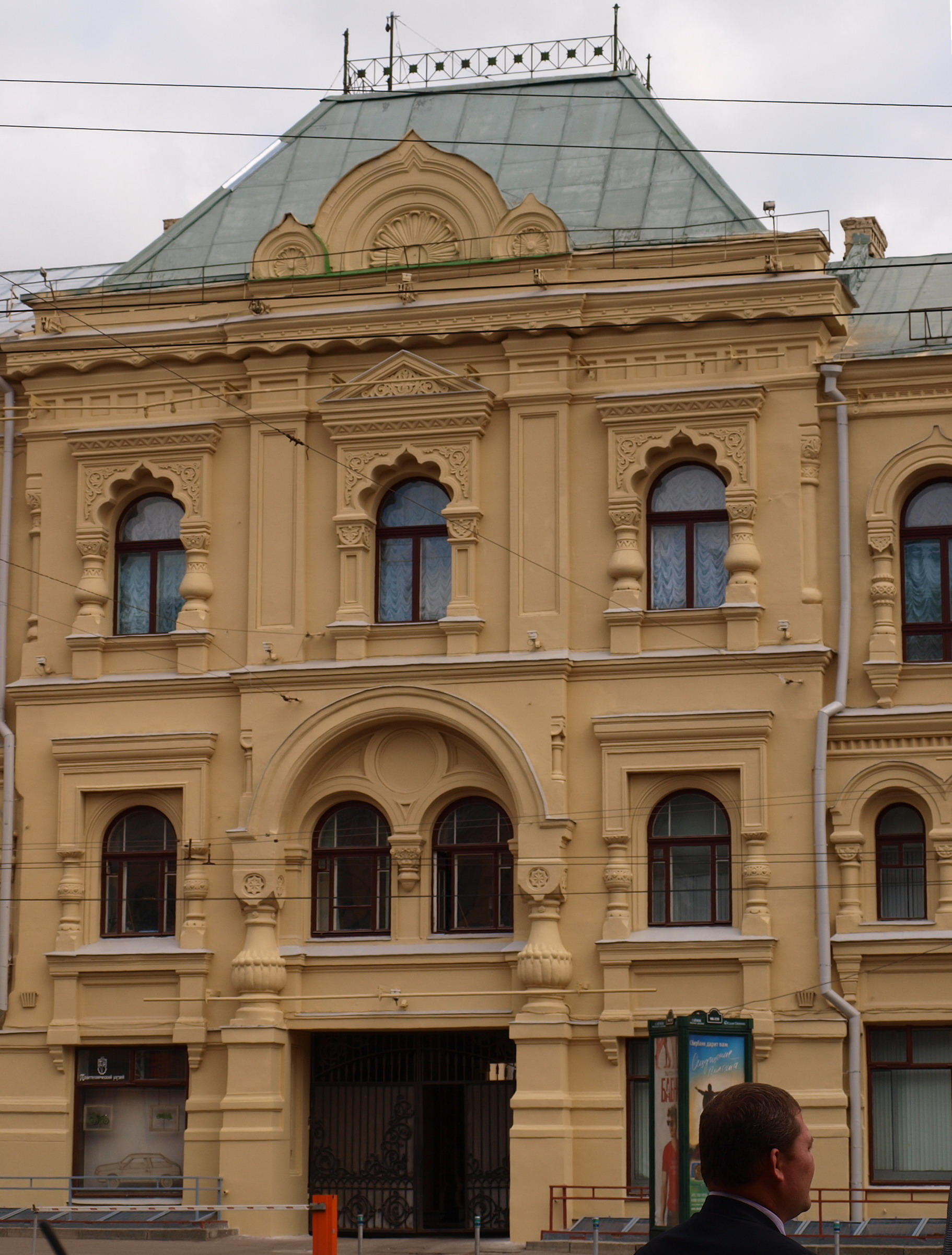 Музей Политехнический (Москва и Московская область, Москва, Новая площадь, 3-5, Политехничсекий пр., 2, Лубянский пр., 4-6)